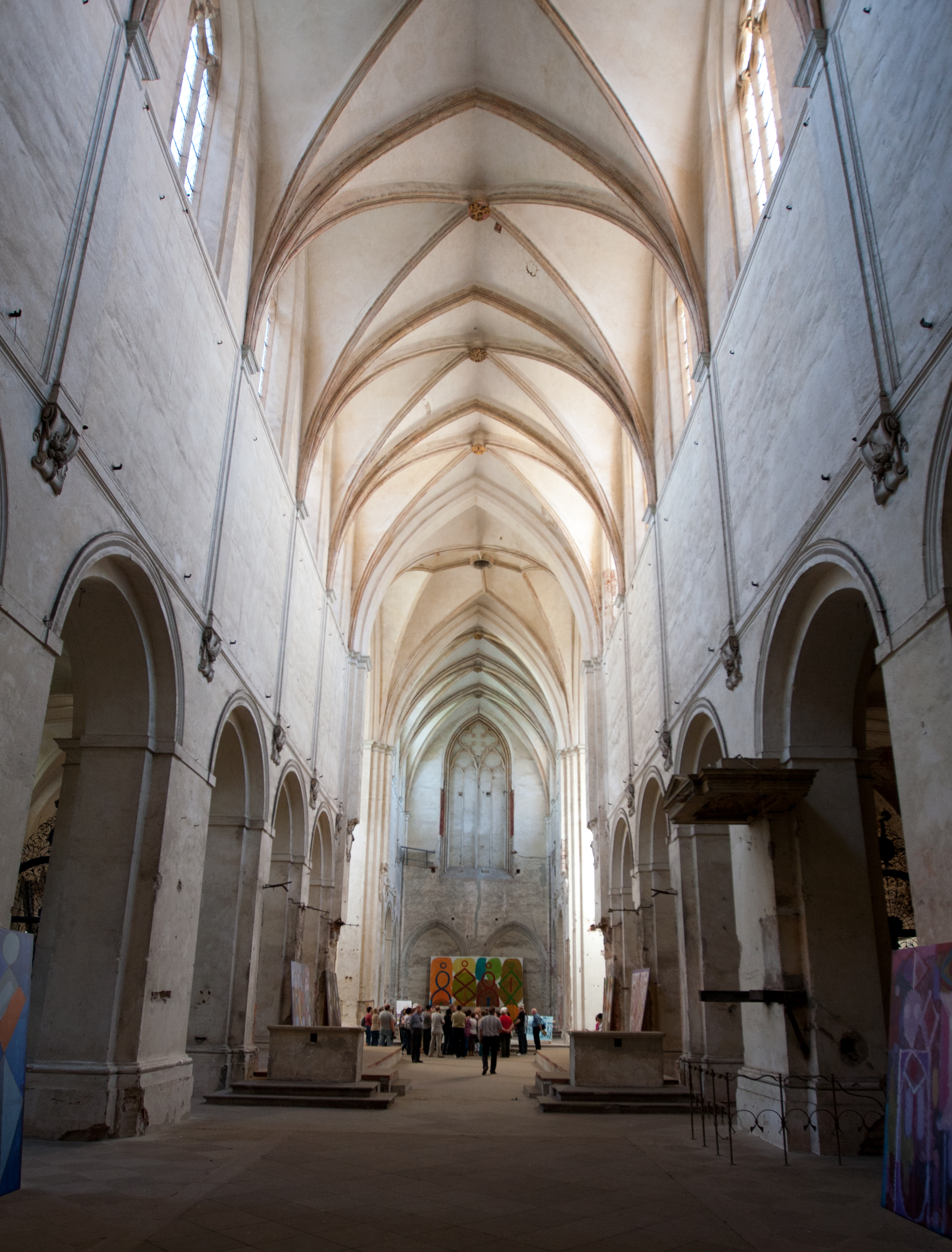 Opactwo cystersów w Lubiążu, nawa główna kościoła klasztornego